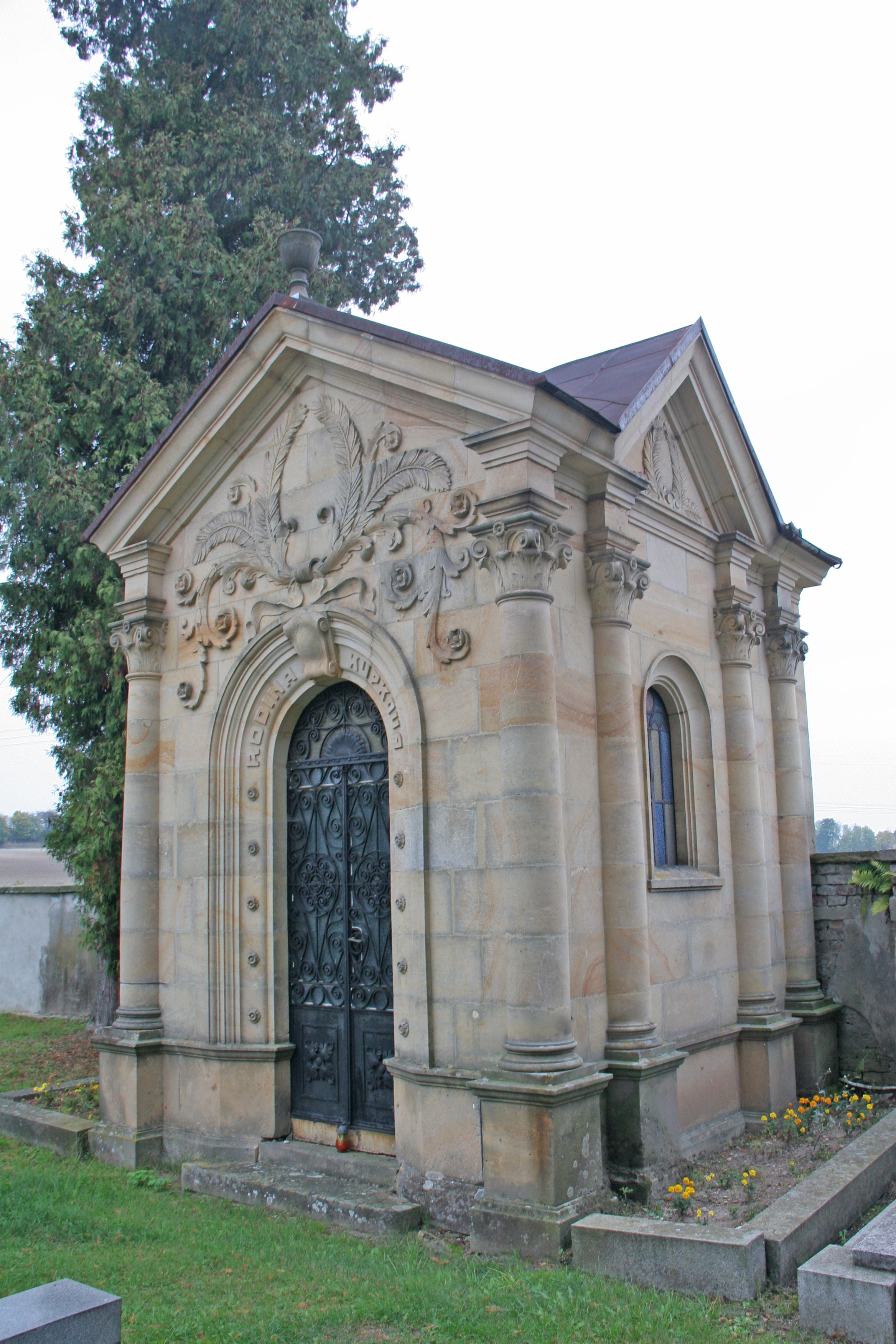 Pohřební hrobka rodiny Kupkových na hřbitově Českobratrské církve evangelické, při cestě do Městce, Klášter nad Dědinou.